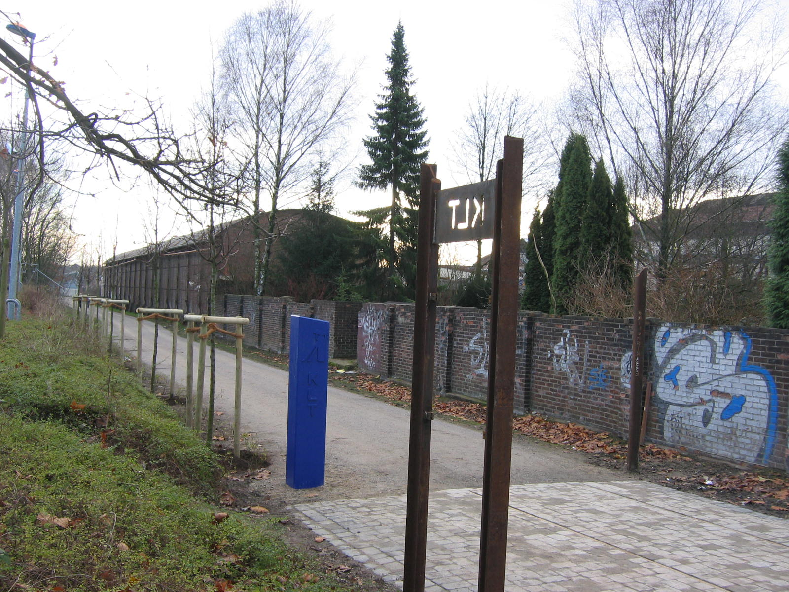 Einstieg des Radweges König-Ludwig